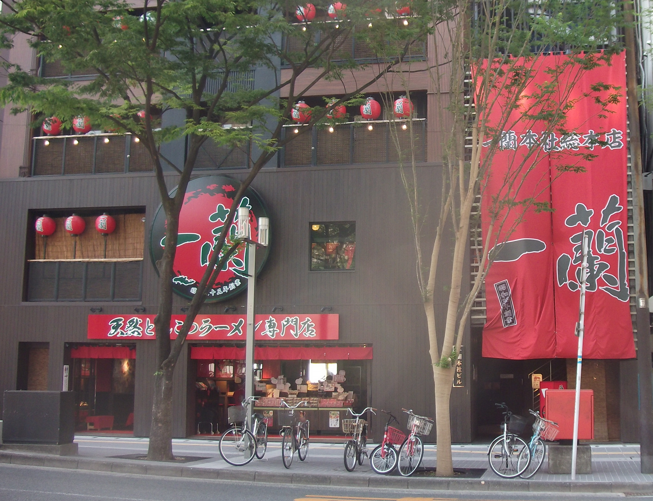 一蘭の本社ビル（福岡市博多区中洲）。